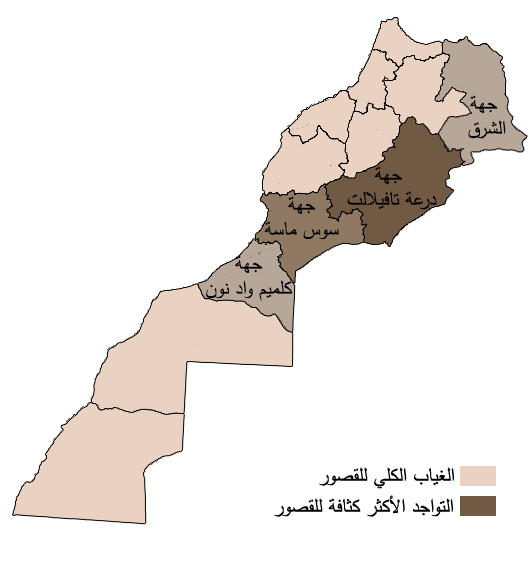 خريطة توضح الجهات التي تنتشر فيها القصور(القرى المحصّنة) في المغرب